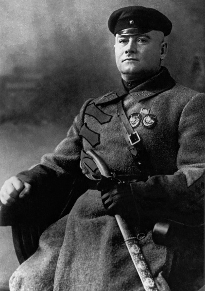 Григорий Котовский